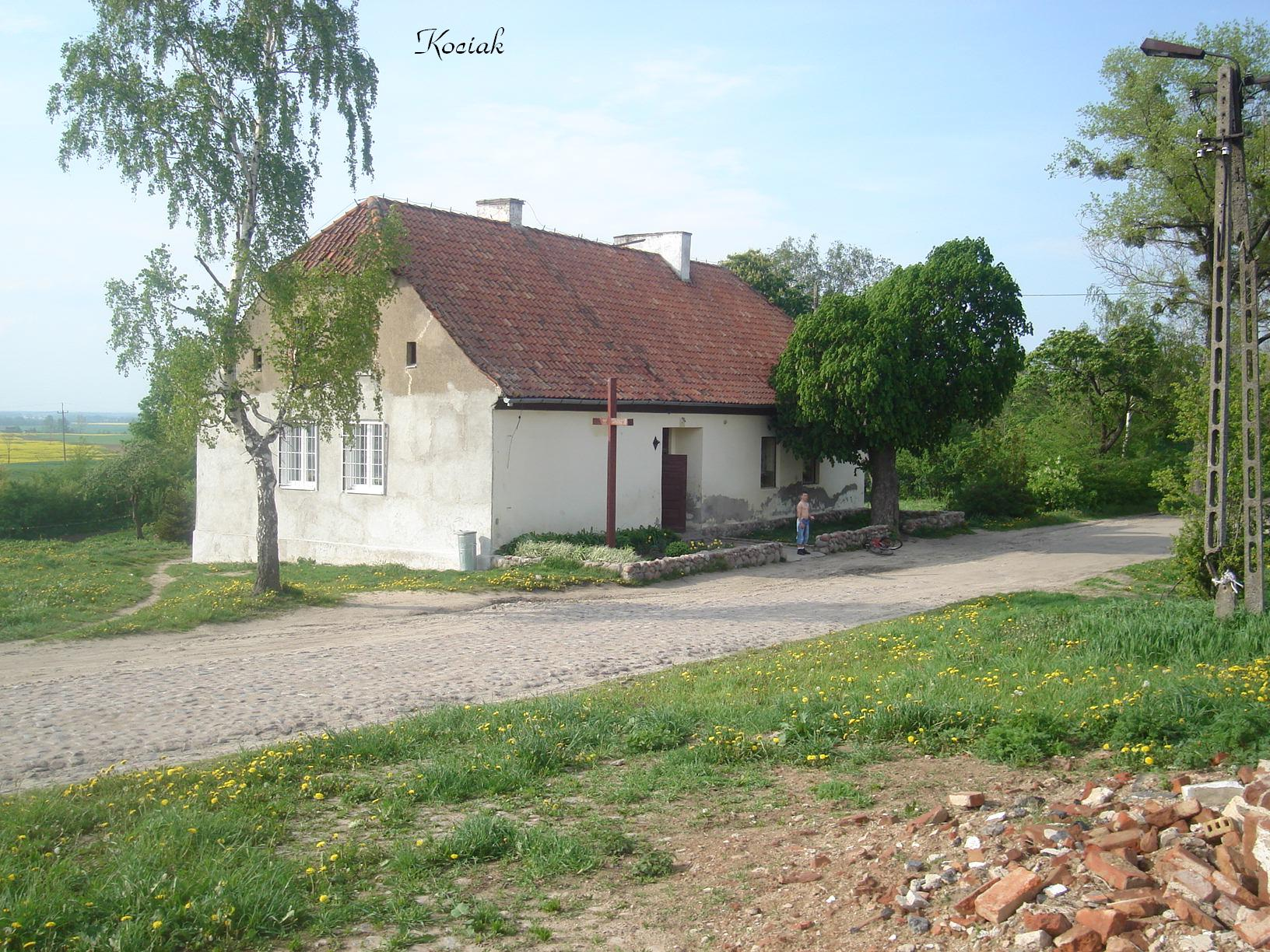 budynek dawnej szkoły w Wandajnach (stan na 2008 rok)